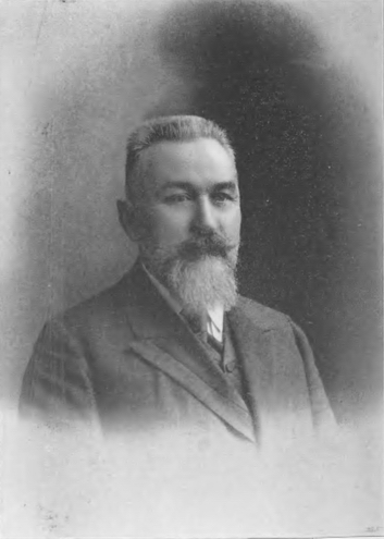 Bolesław Mańkowski (ur. 20 listopada 1852 w Lubaczowie, zm. 26 sierpnia 1921 we Lwowie) – polski pedagog, bibliotekarz, archiwista